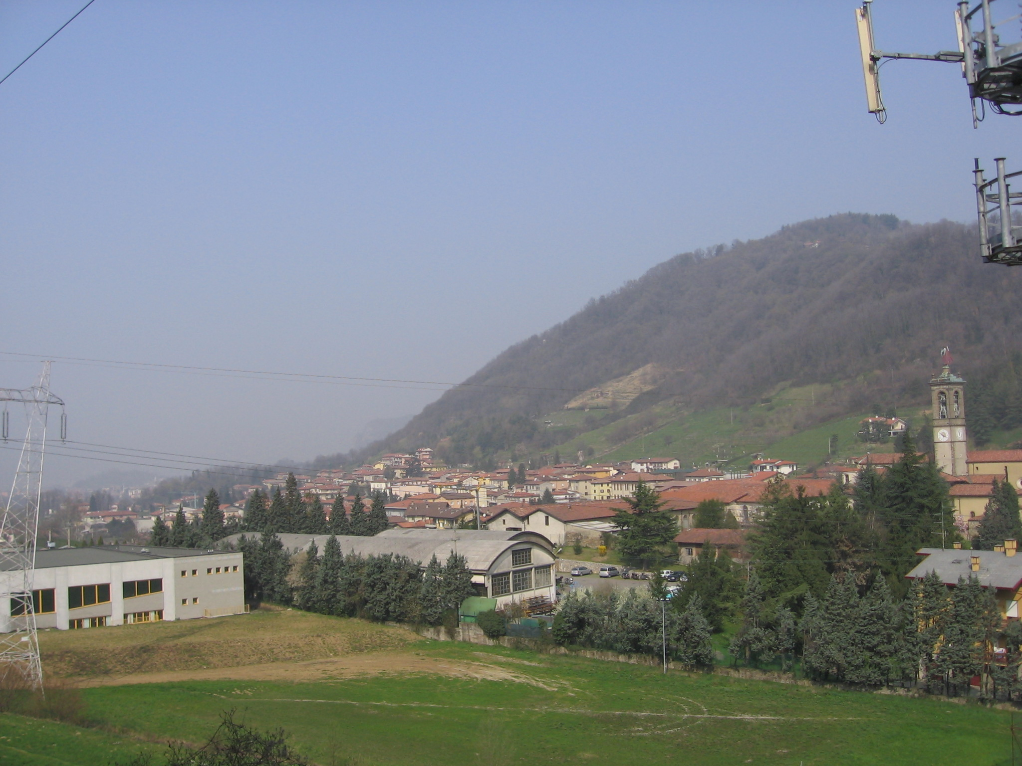 Pontida, Bergamo, Italia